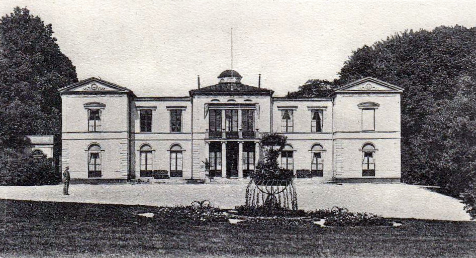 Rosendals slott, omkring år 1900.